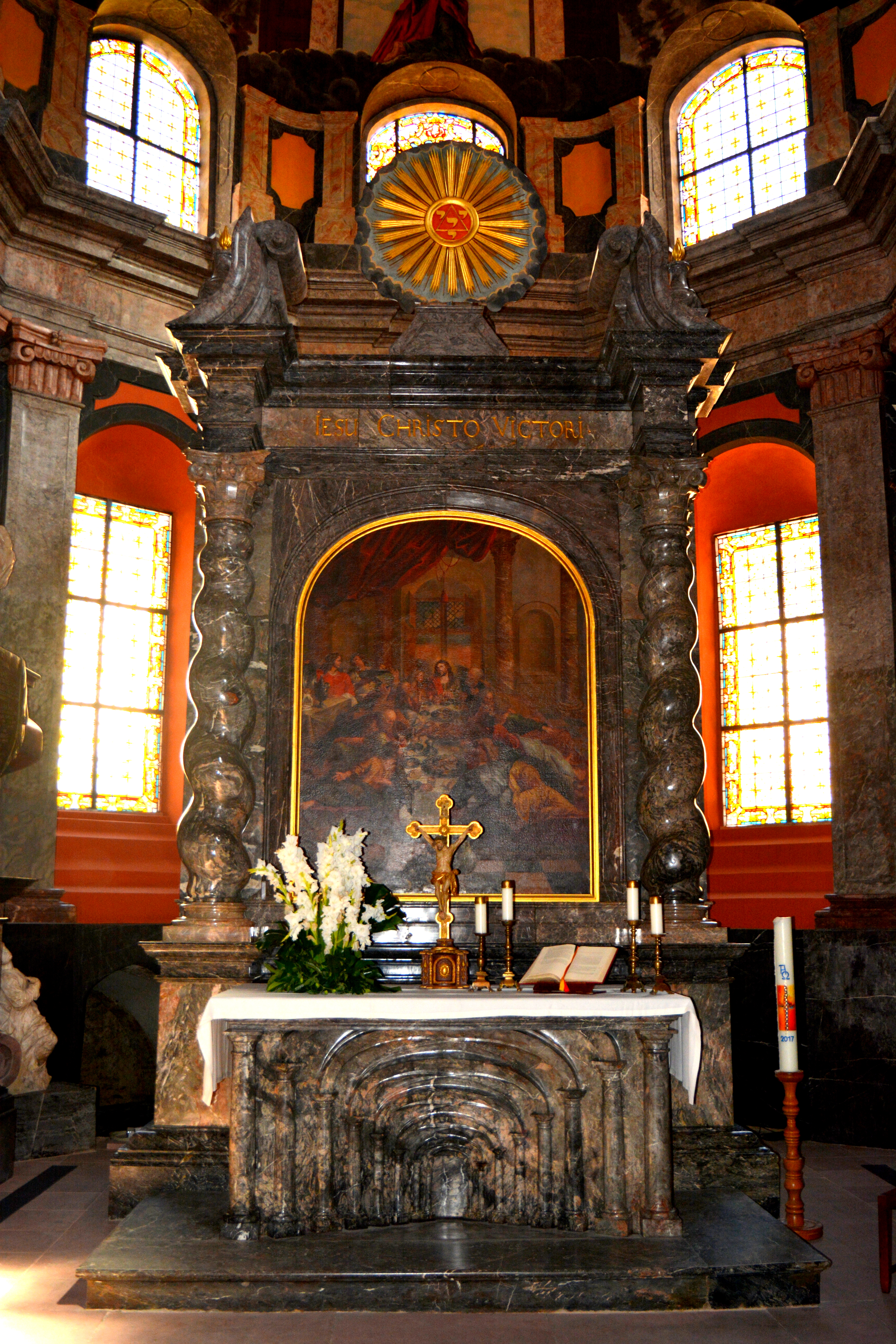 Idstein, Unionskirche, Altar